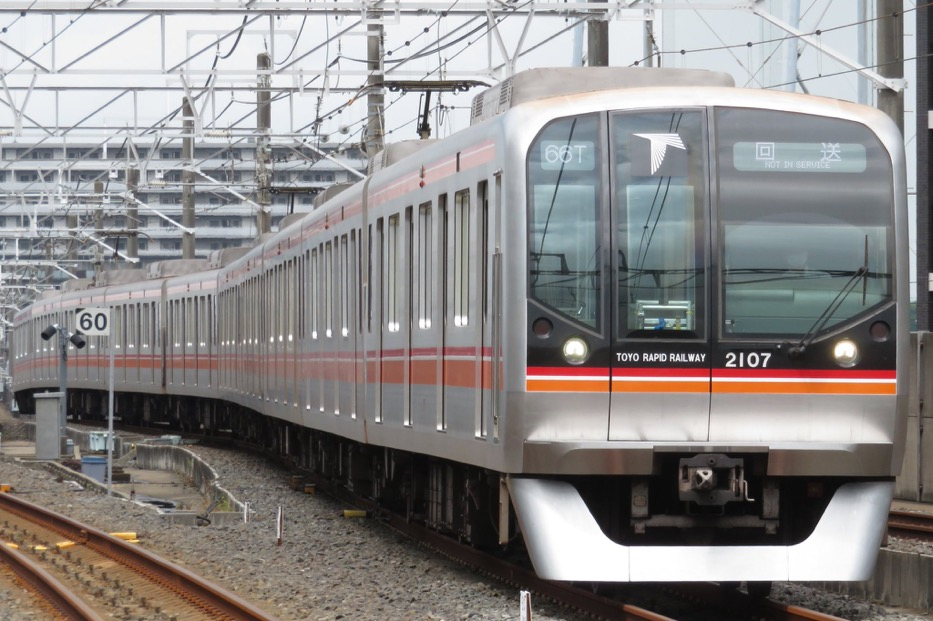 東葉高速2000系2107F 回送 八千代緑が丘駅